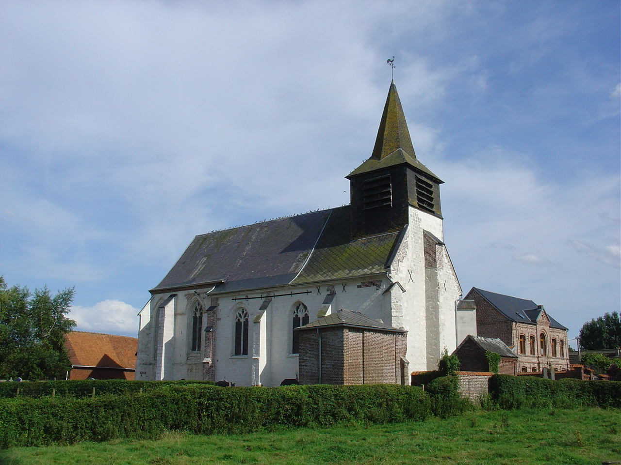 Église de Tangry